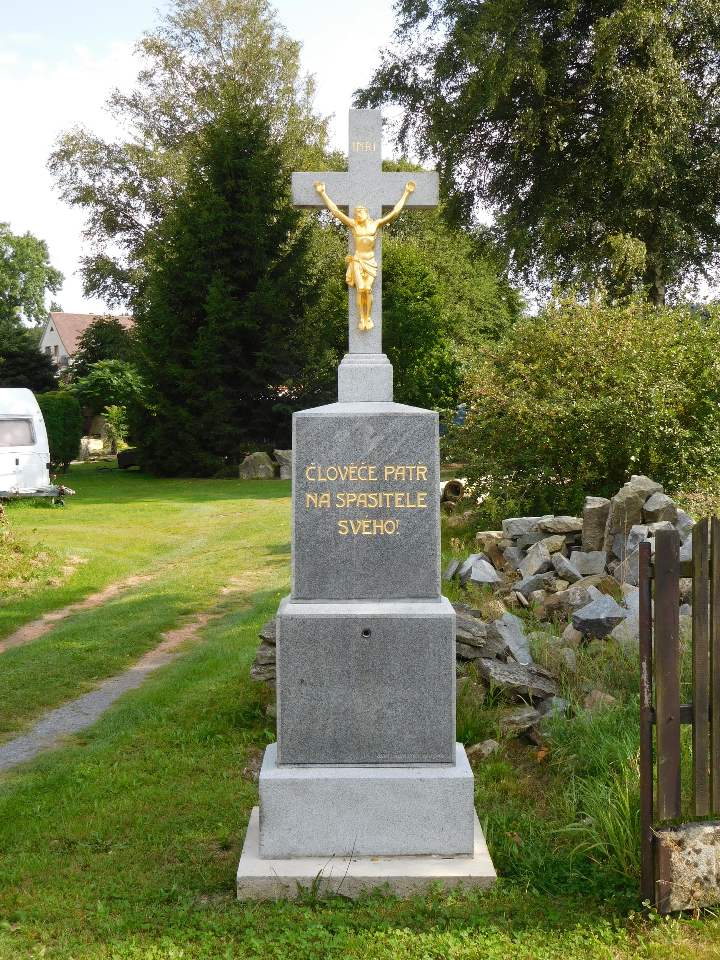 Moravská Svratka - krucifix